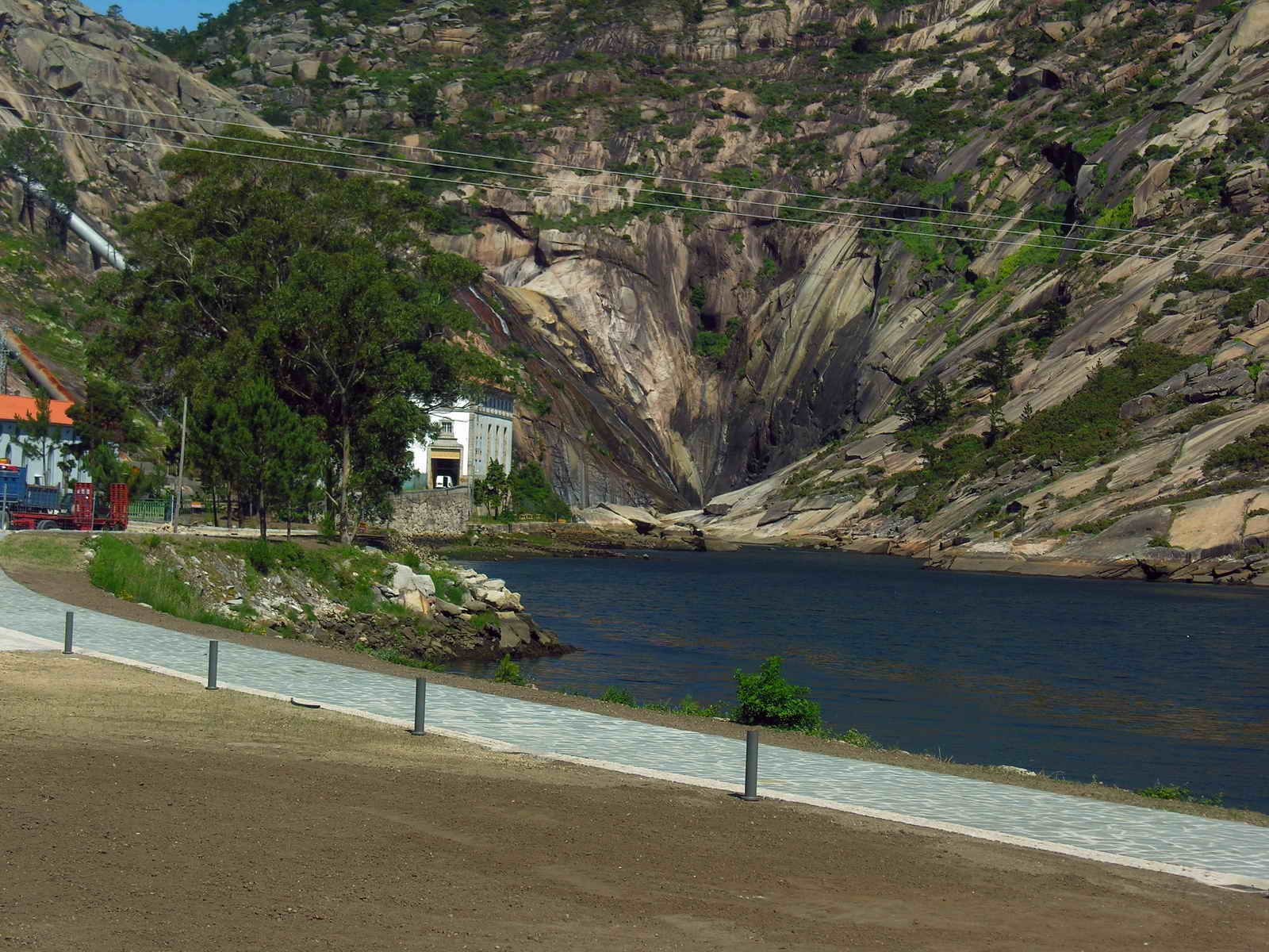 Desembocadura do Río Xallas, Ézaro (A Coruña). Foto tirada cunha Nikon E8800